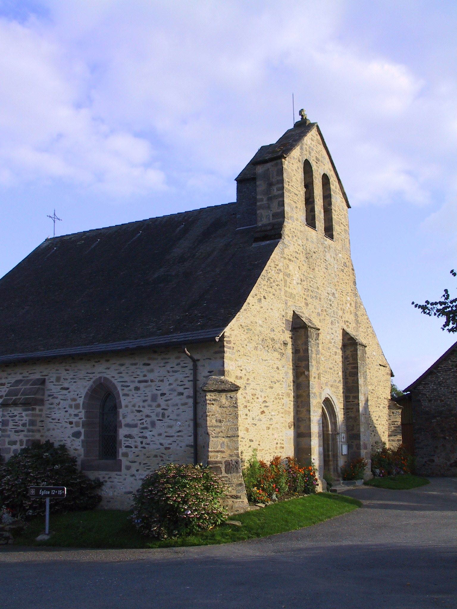 Église Saint-Julien de Brioude, (Classé, 1922) .